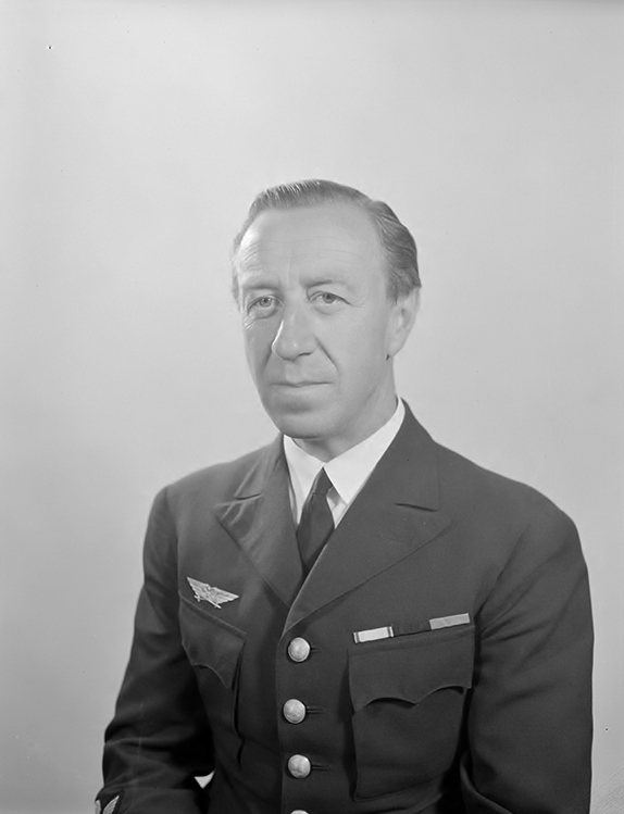 Motiv: Porträtt av general Lage Thunberg, chef för Flygvapnet 1961-1968. Tillhör Gamla Malmen-samlingen. GM 1205a. Ur Flygvapenmuseums bildarkiv. IDENTIFIKATIONSNUMMER FVMF.002589